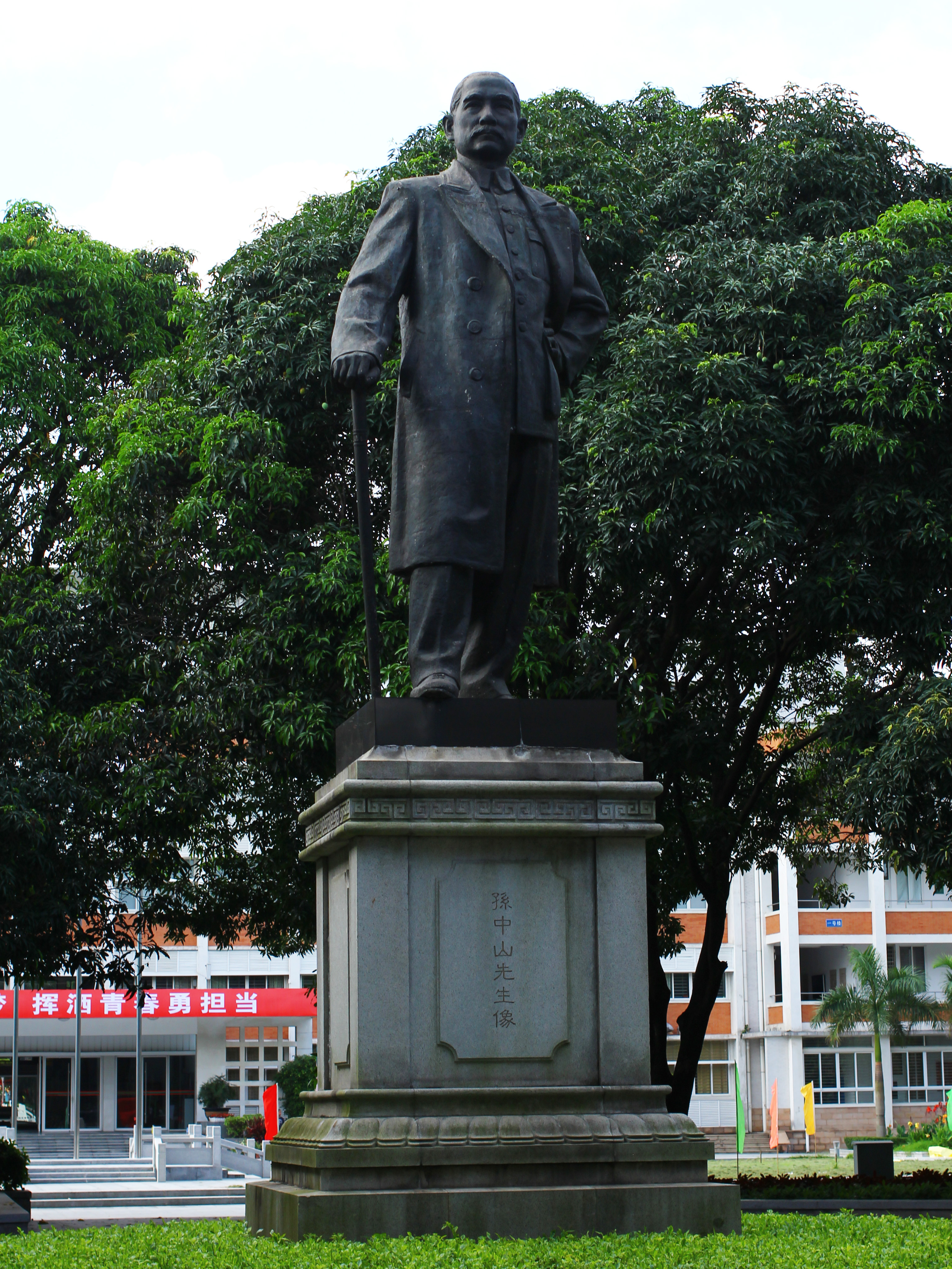 華南理工大學的孫中山先生像，曾置於廣州中山紀念堂。華工校園為國立中山大學校園，原由梅屋莊吉贈送的中山像已於1954被當局移走，1956年11月12日移至新的中山大學（私立嶺南大學）。